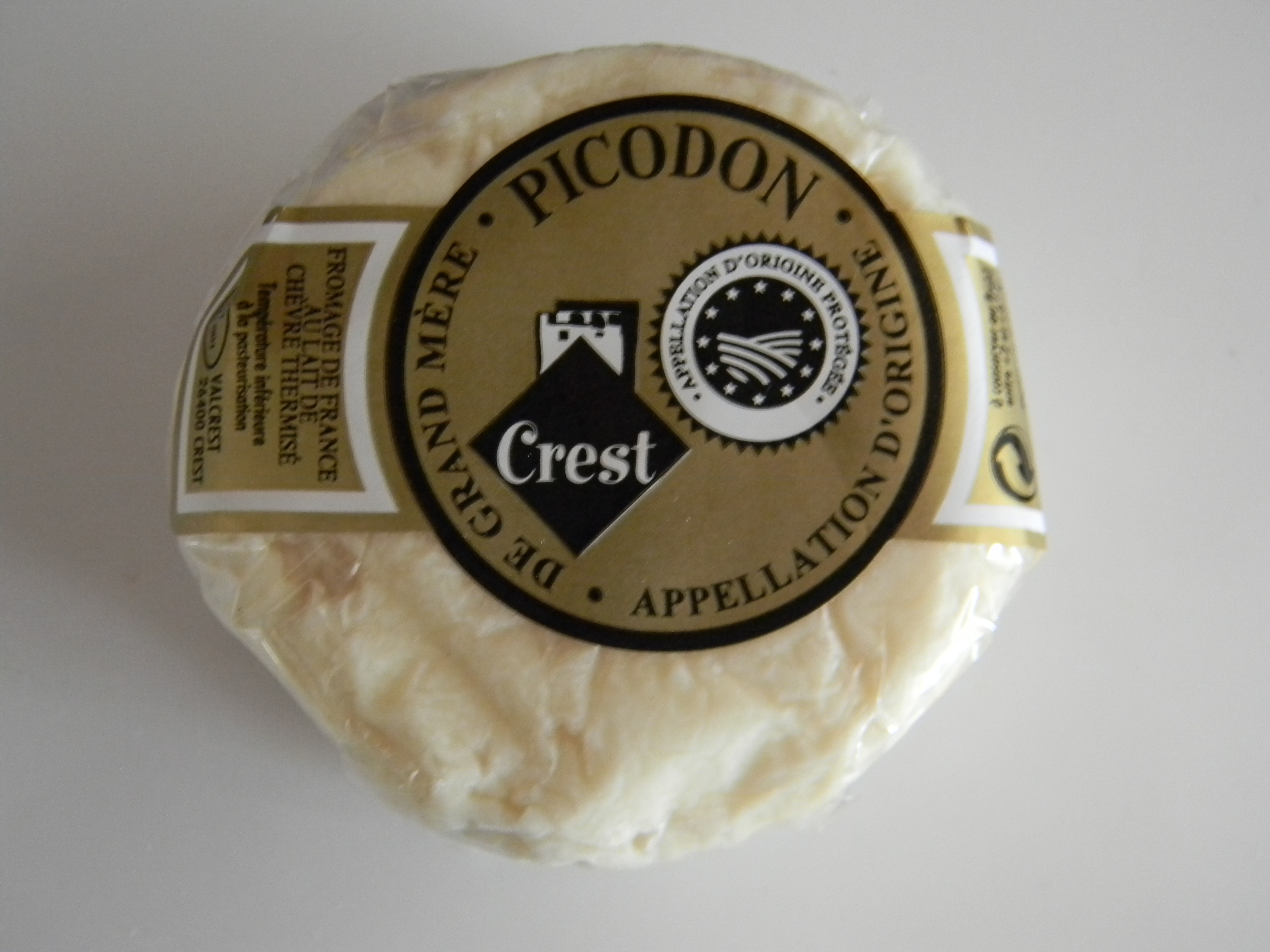 Picodon au lait de chèvre thermisé - Appellation d'Origine Protégée - Laiterie industrielle Valcret à Crest (Drôme)